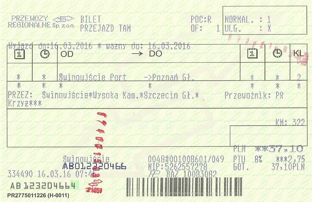 Bilet kolejowy spółki PR (skan)